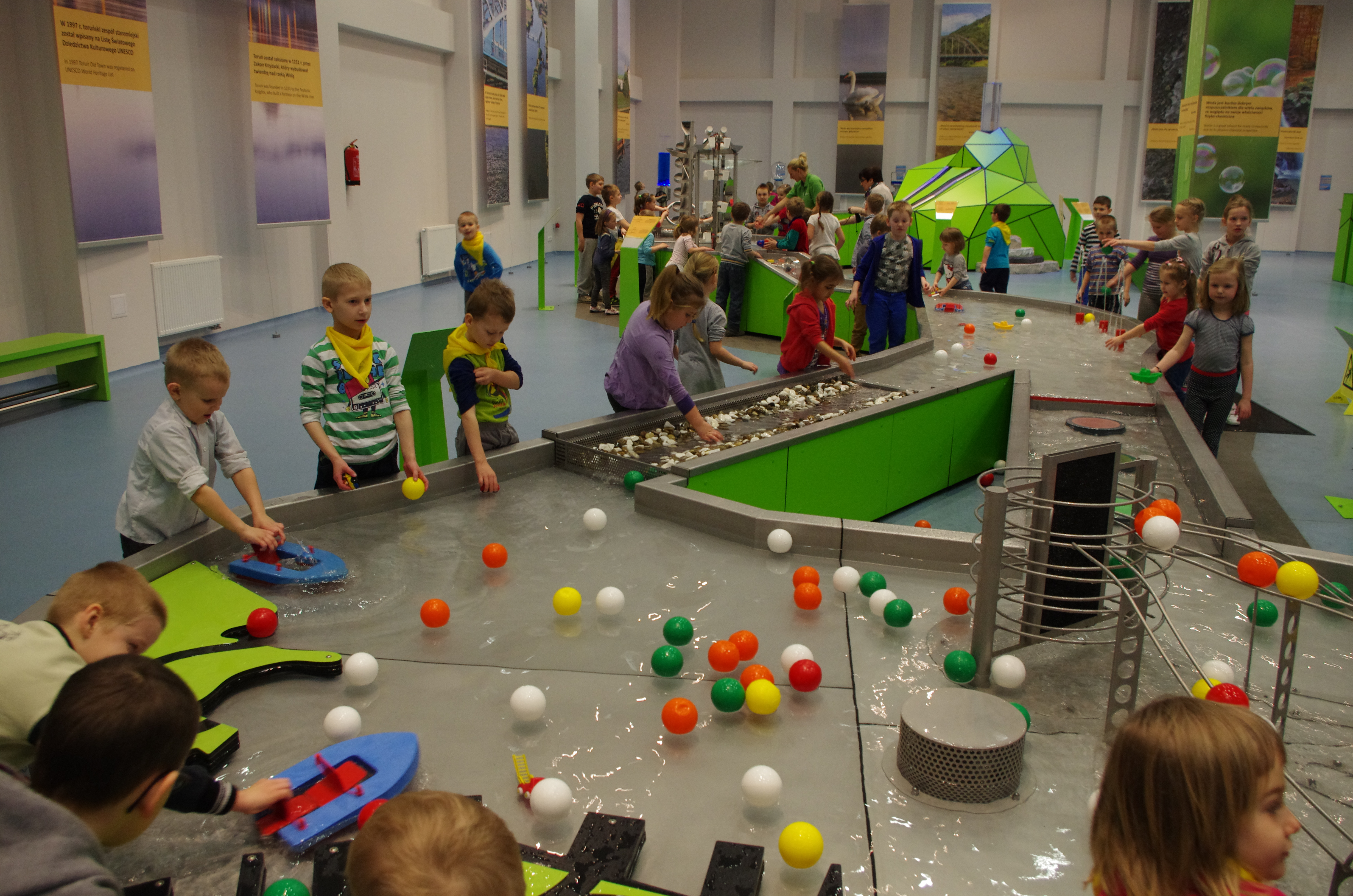 Wystawa stała "Rzeka"